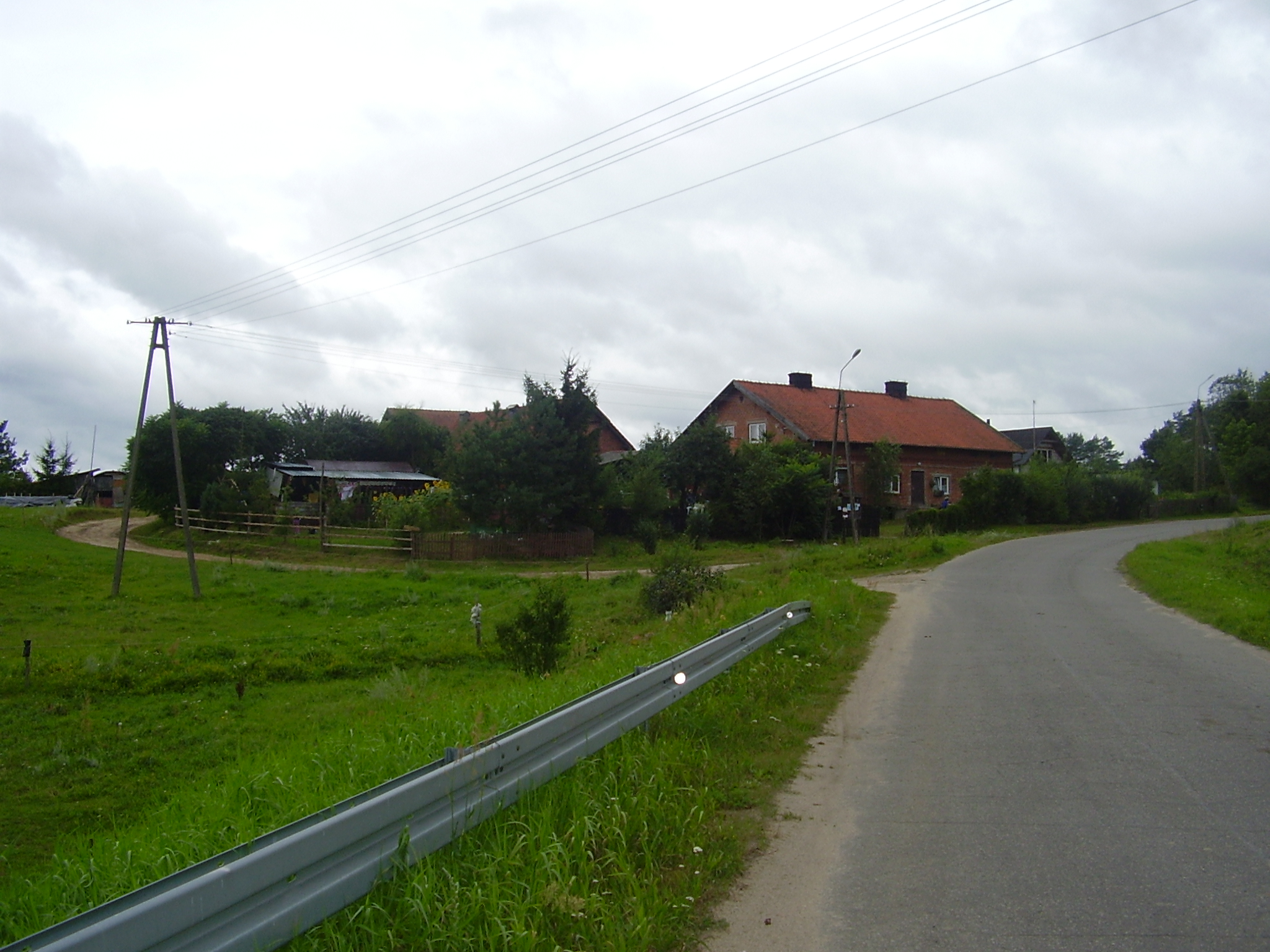 Droga Rosocha sierpień 2012